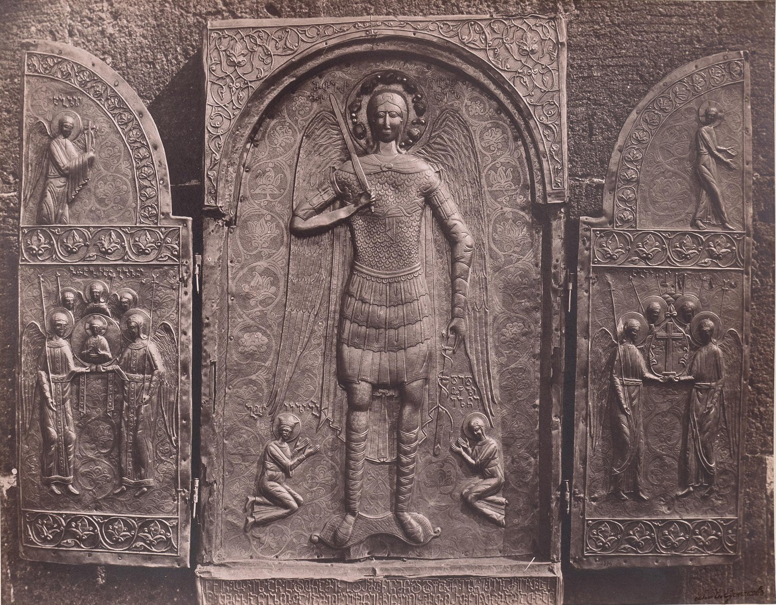 ანგელოზთა დასი, კარედი ჯუმათიდან